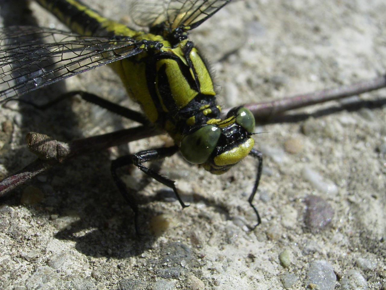 Nahaufnahme einer Gomphus vulgatissimus